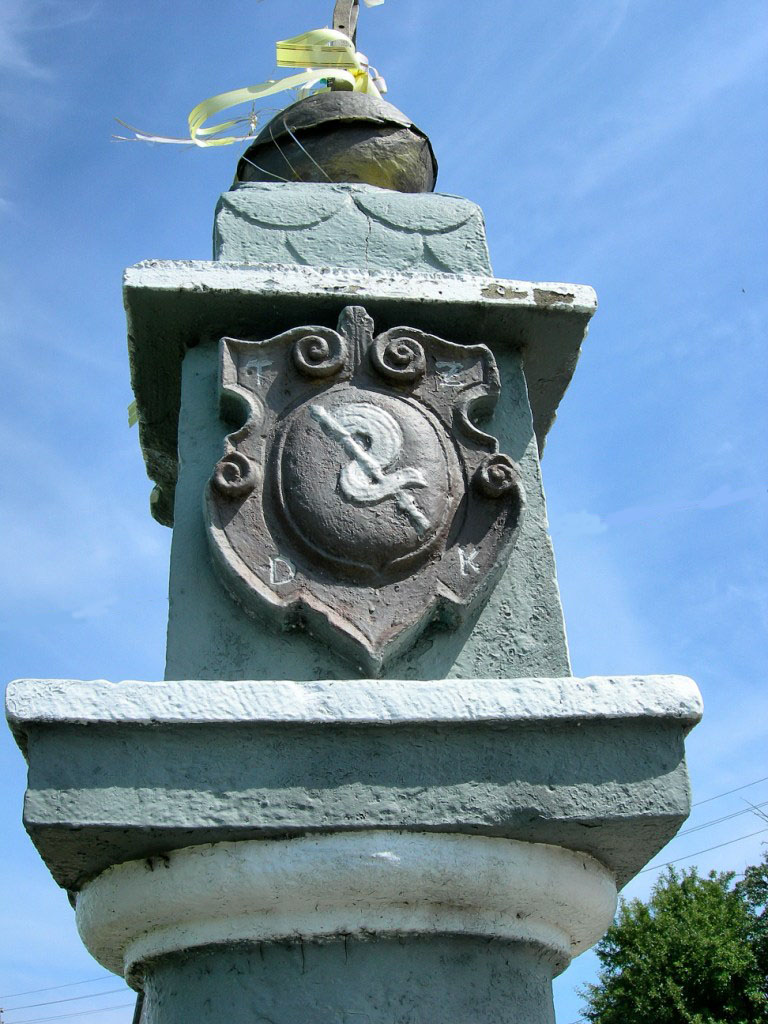 XVII-wieczna kolumna w Gzowicach-Folwarku